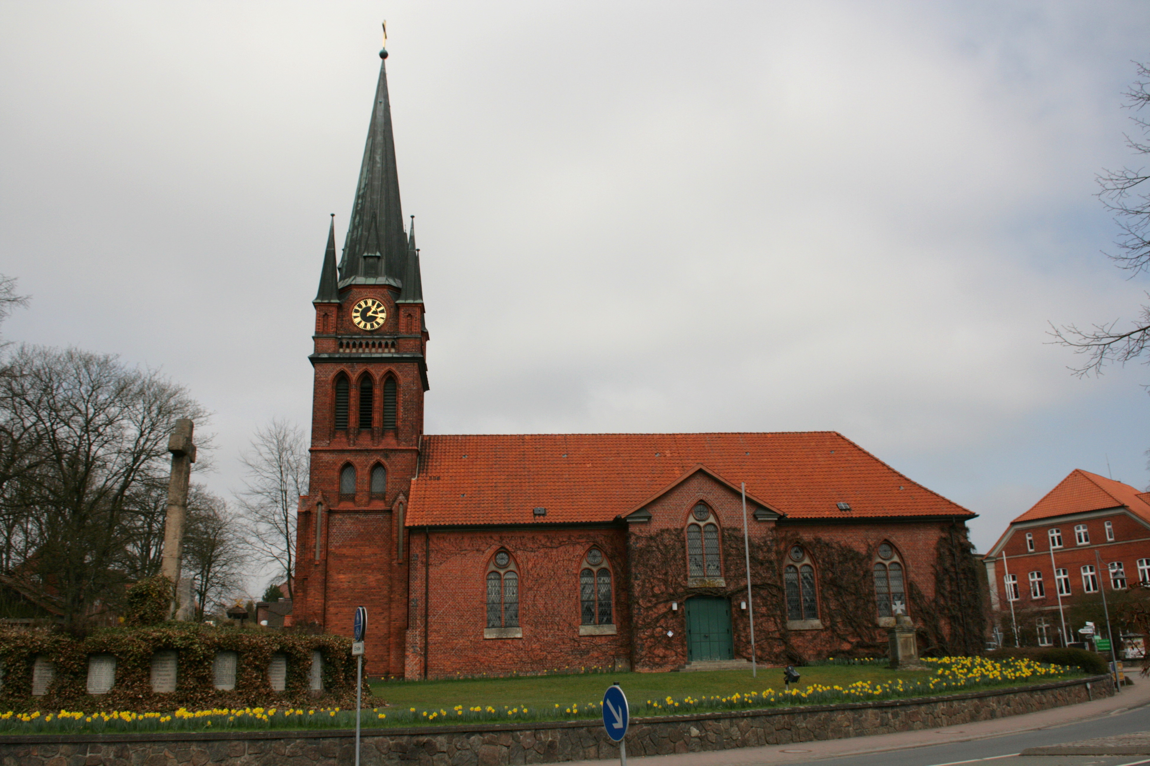 Ev.-luth. Kirche Sankt Hippolit in Amelinghausen